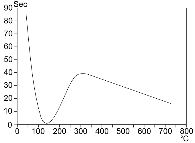 Leidenfrost temperature no text